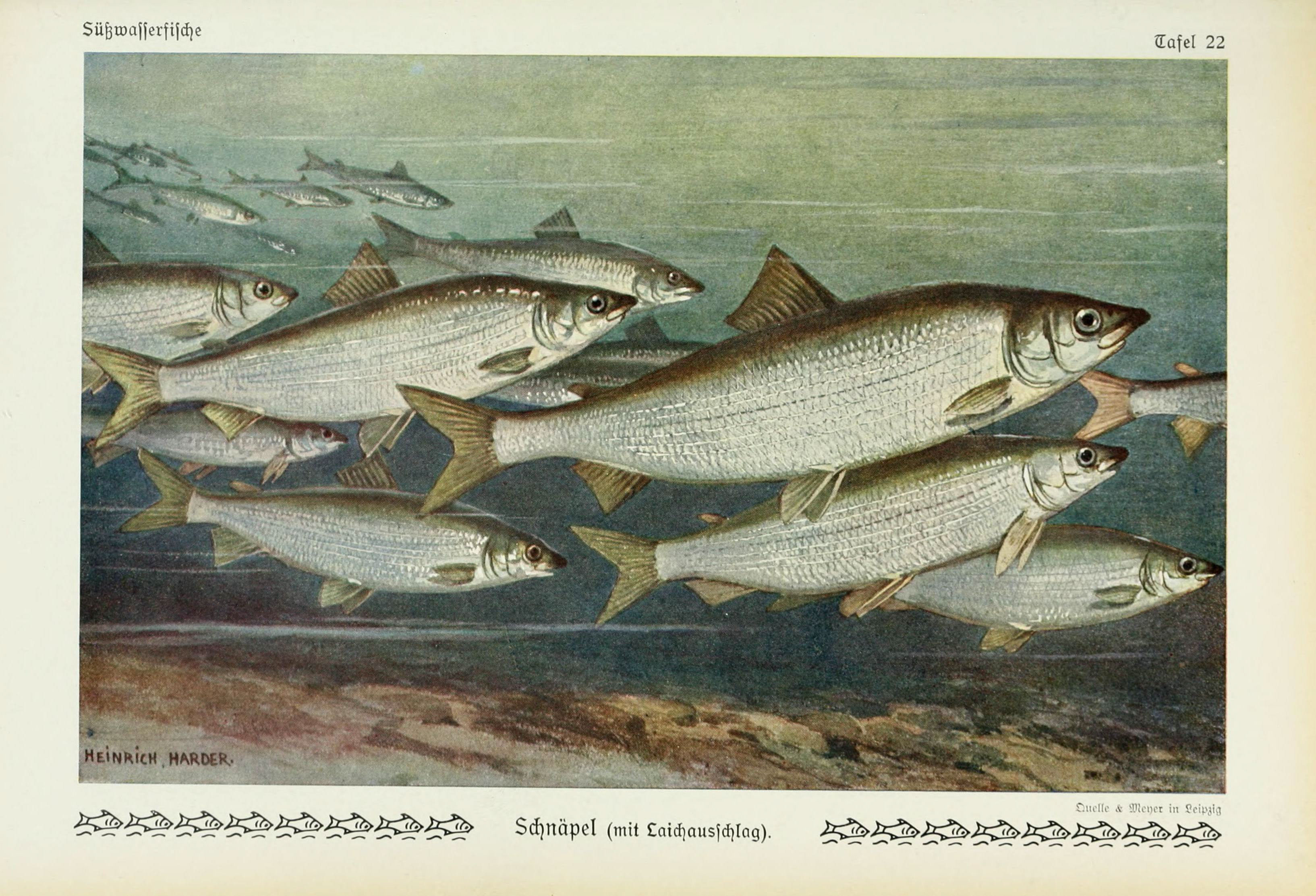 .& «• O- »ff CO pH rel FU .M(